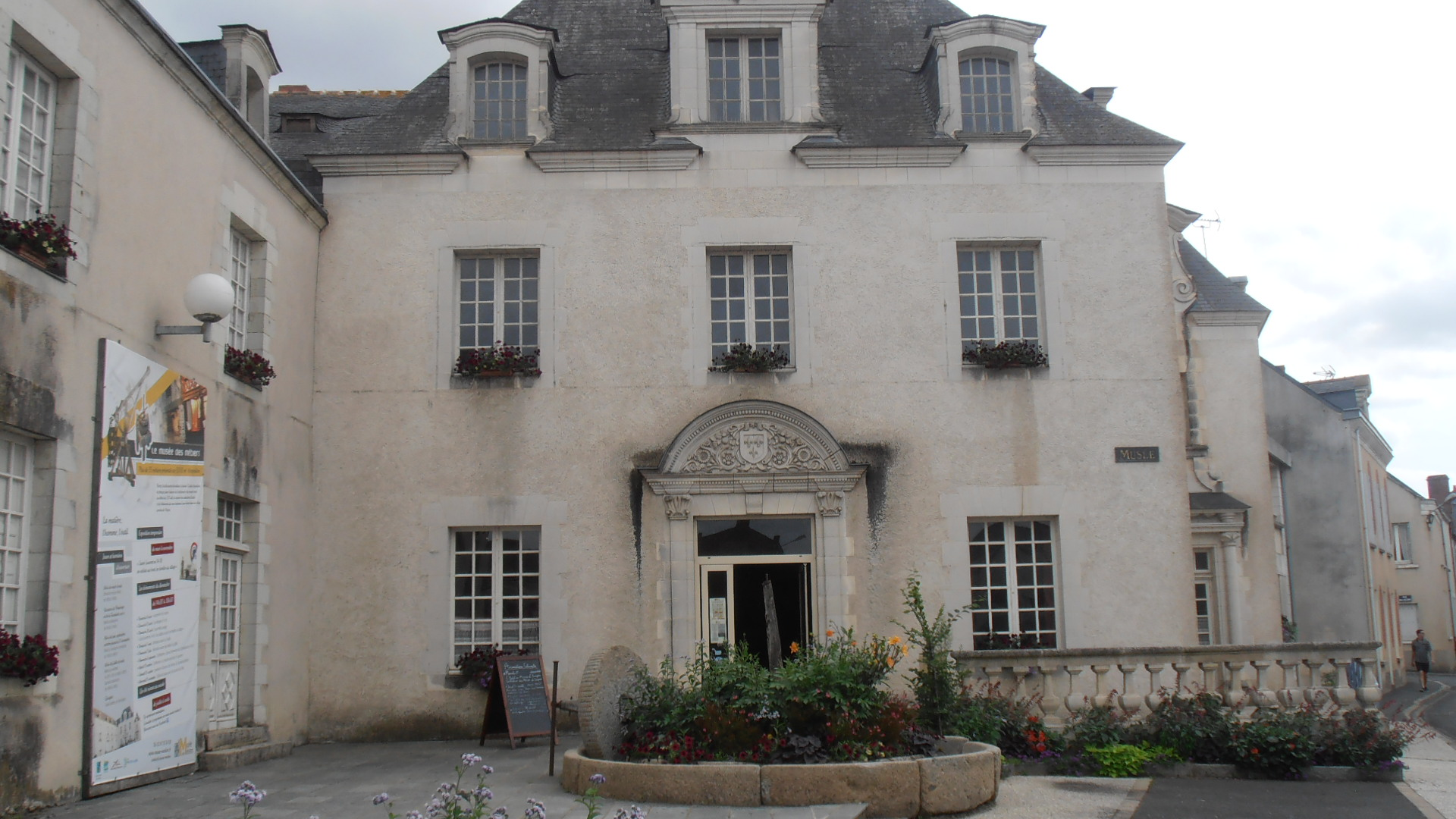 Le musée des métiers de Saint-Laurent-de-la-Plaine (Maine-et-Loire, France), comprenant une collection d'objets et outils représentatifs de plus de 35 métiers.